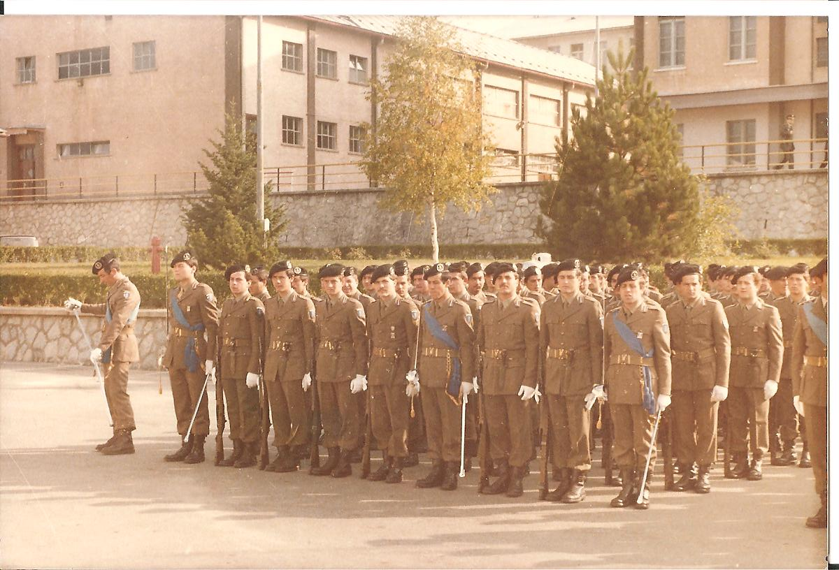 Caserma "Giovanni Ruazzi" cerimonia ufficiale.